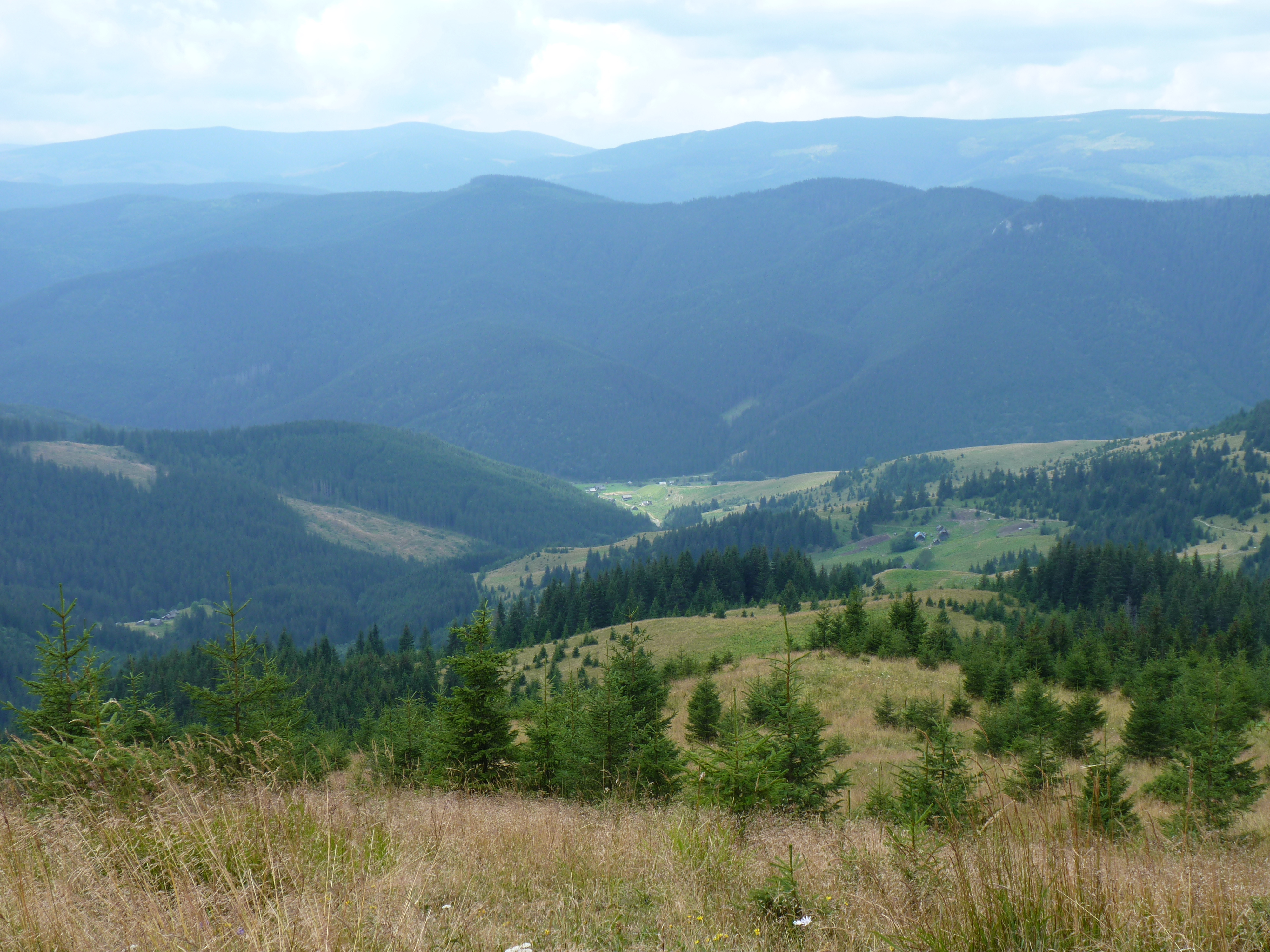 Черемоський, Путильський район